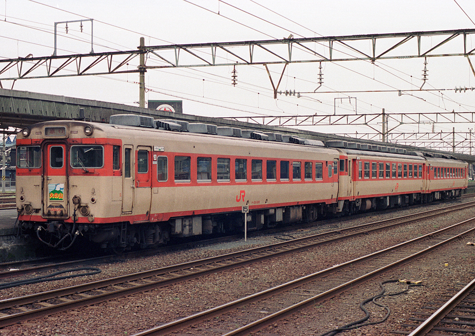 JR九州 急行「火の山」キハ58 606